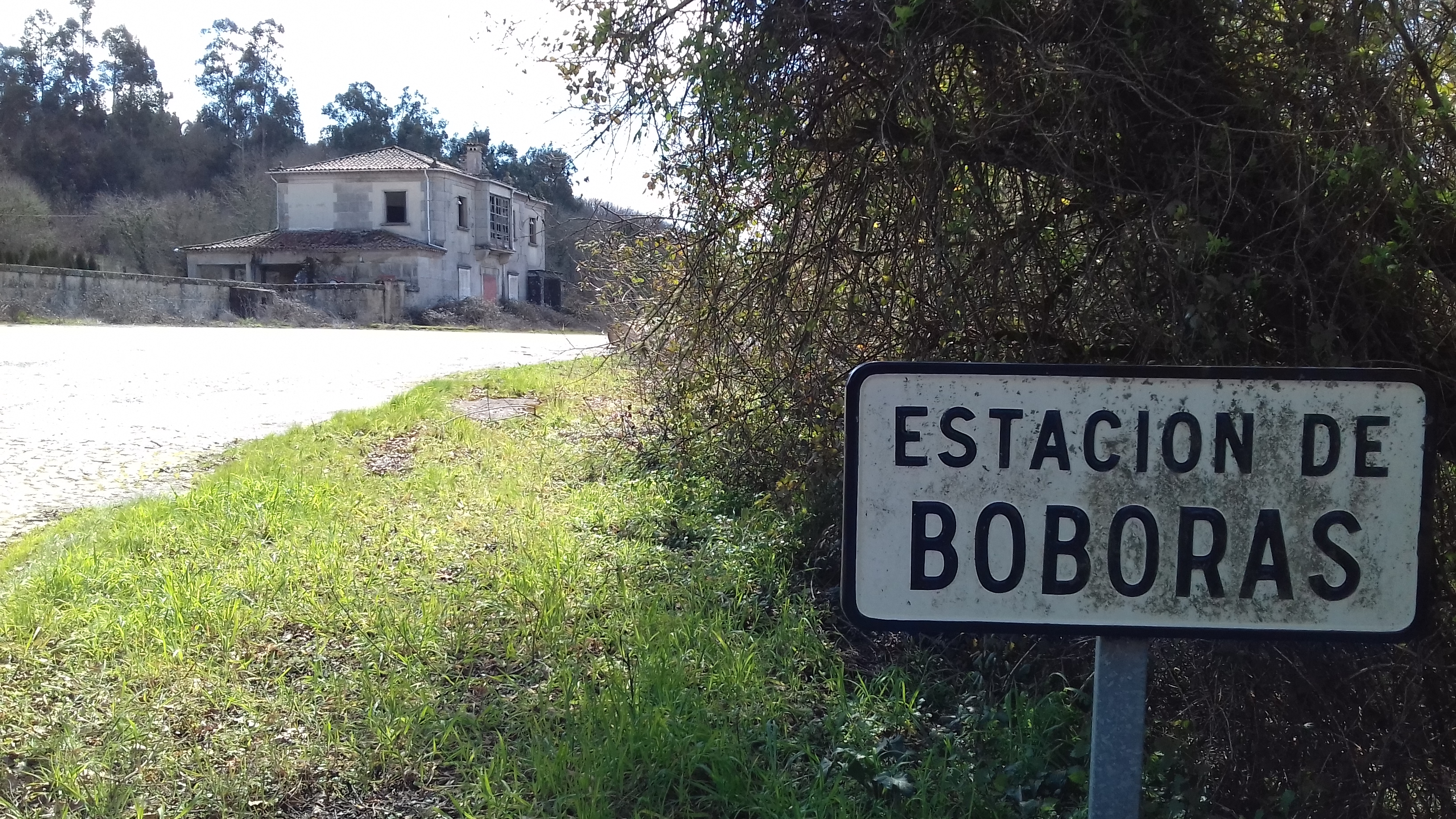 Estación de Boborás